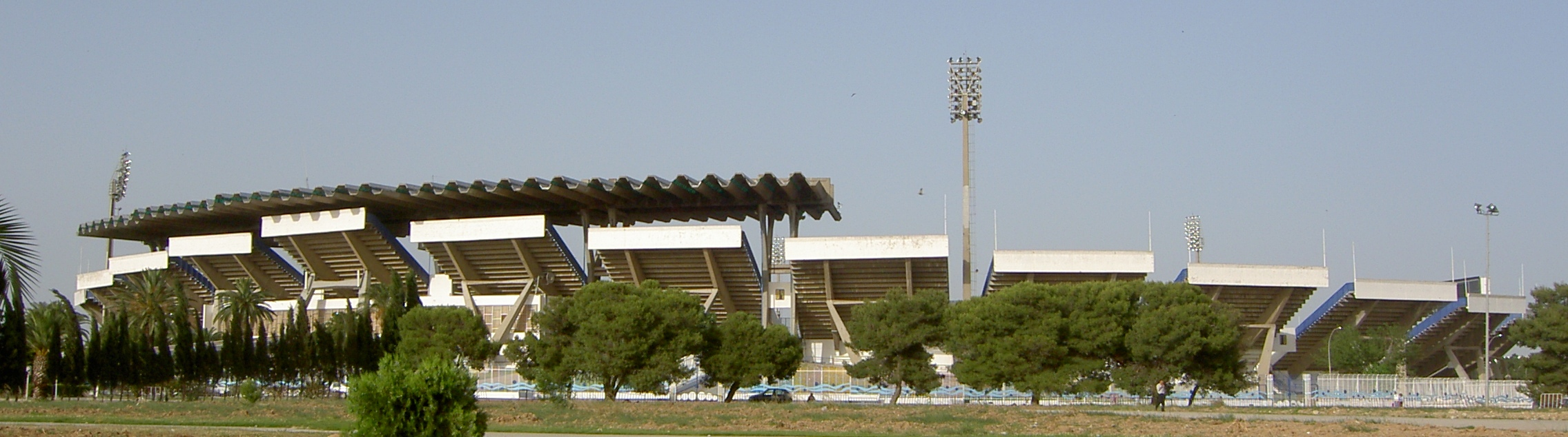 El Menzah Stadium, El Menzah, Tunis, Tunisia